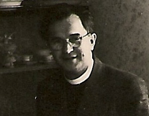 Farář Alois Frajt v roce 1957